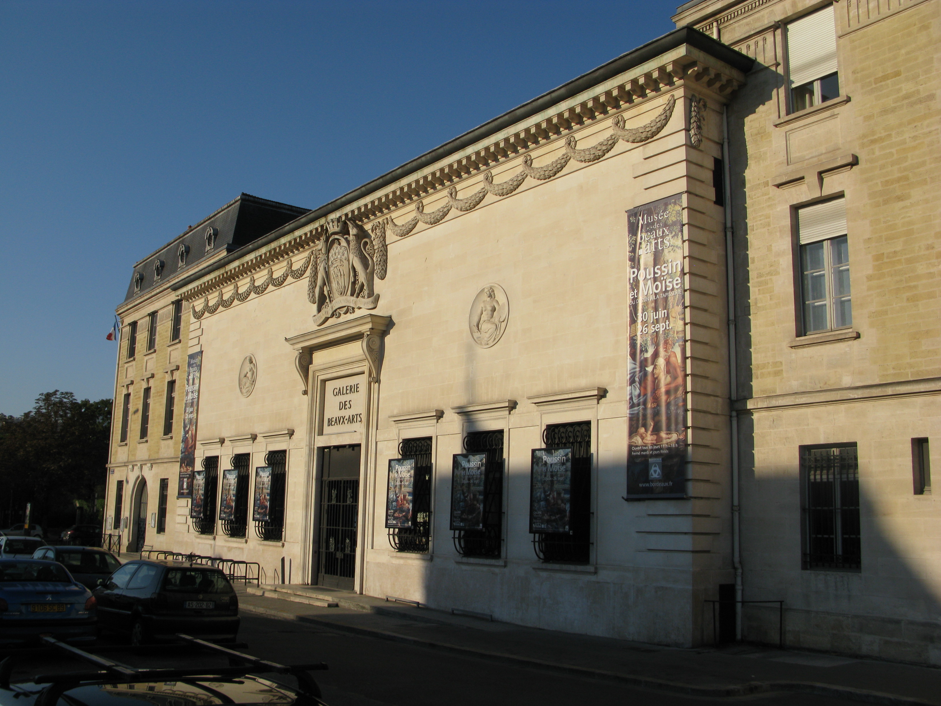 La galerie des beaux arts de Bordeaux qui accueille les expositions temporaires du musée des beaux arts.